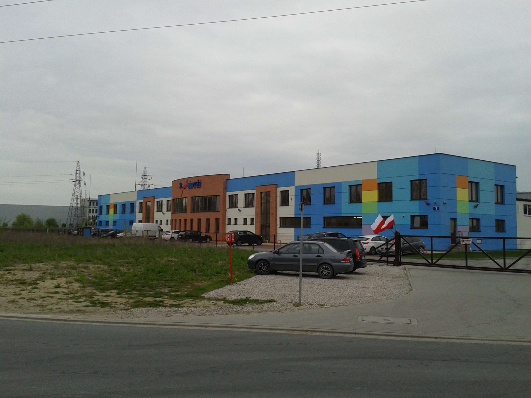 Nowy budynek fabryki St. Majewski w Pruszkowie